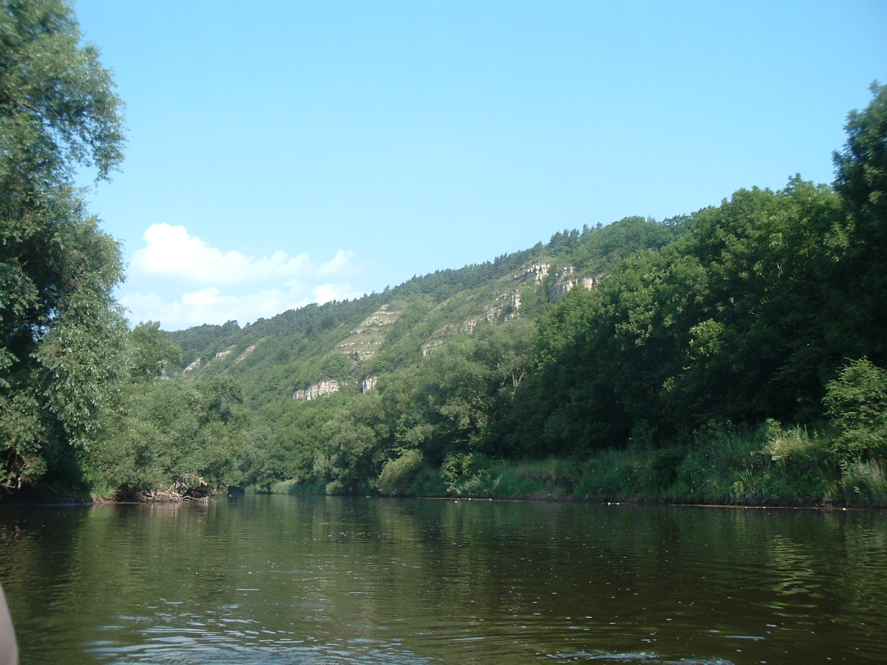 Die Felspartie der Nordmannsteine und das Klosterholz bei dem Ort Ebenau unterhalb von Creuzburg/Werra; aufgenommen bei einer Kanutour